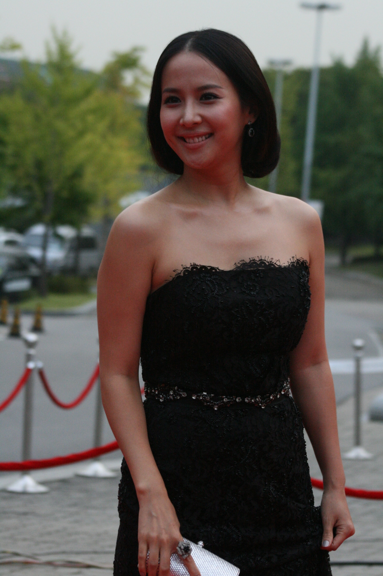 2009 서울 드라마 어워드